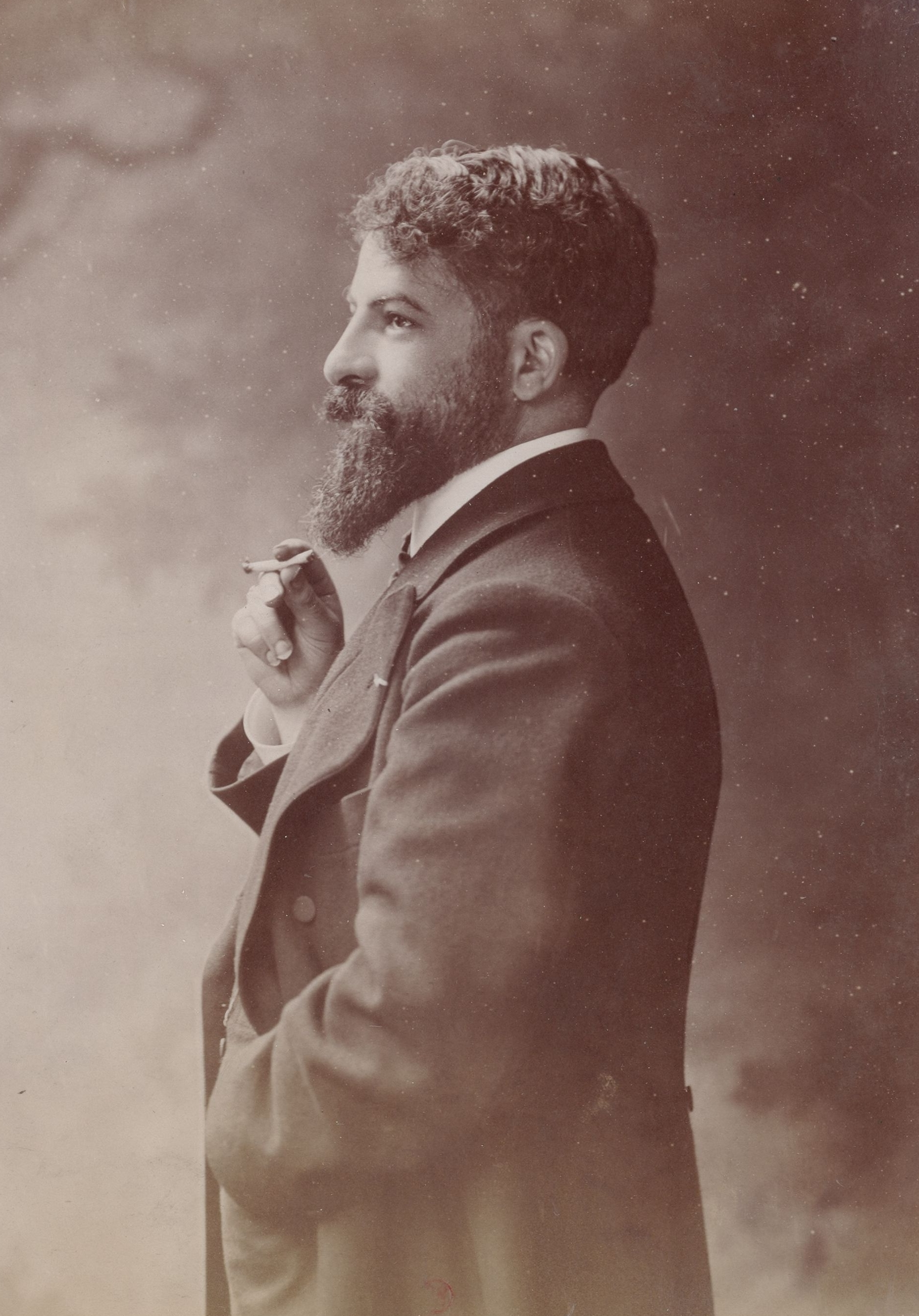 M. Synave. Peintre.